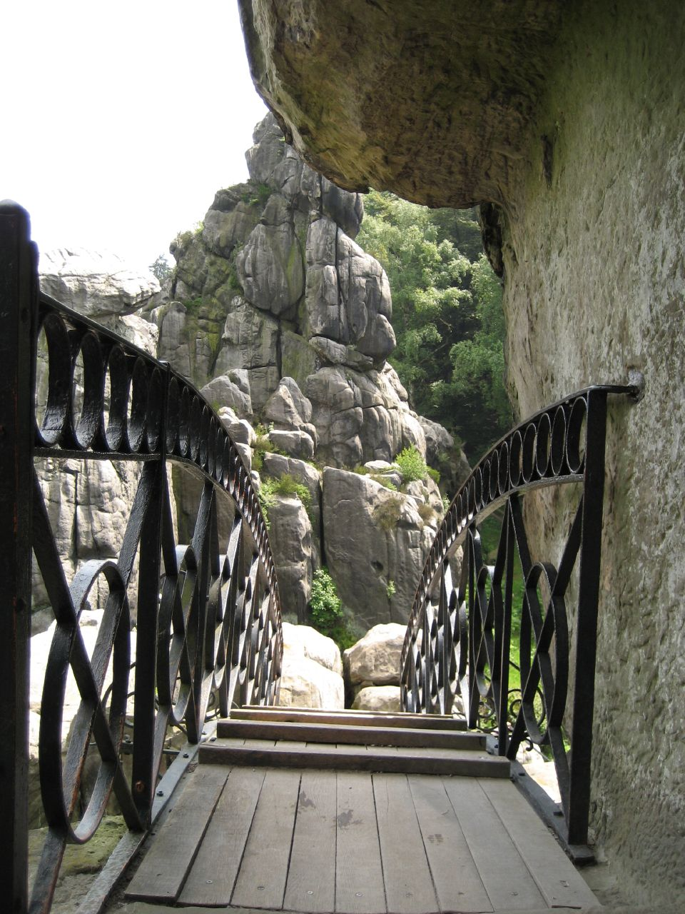 Externsteine